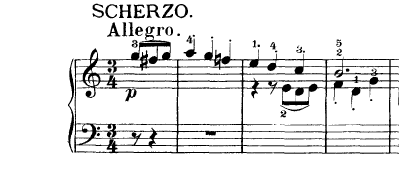 Compassos iniciais do terceiro movimento da Sonata Op. 2 n. 3 de Beethoven